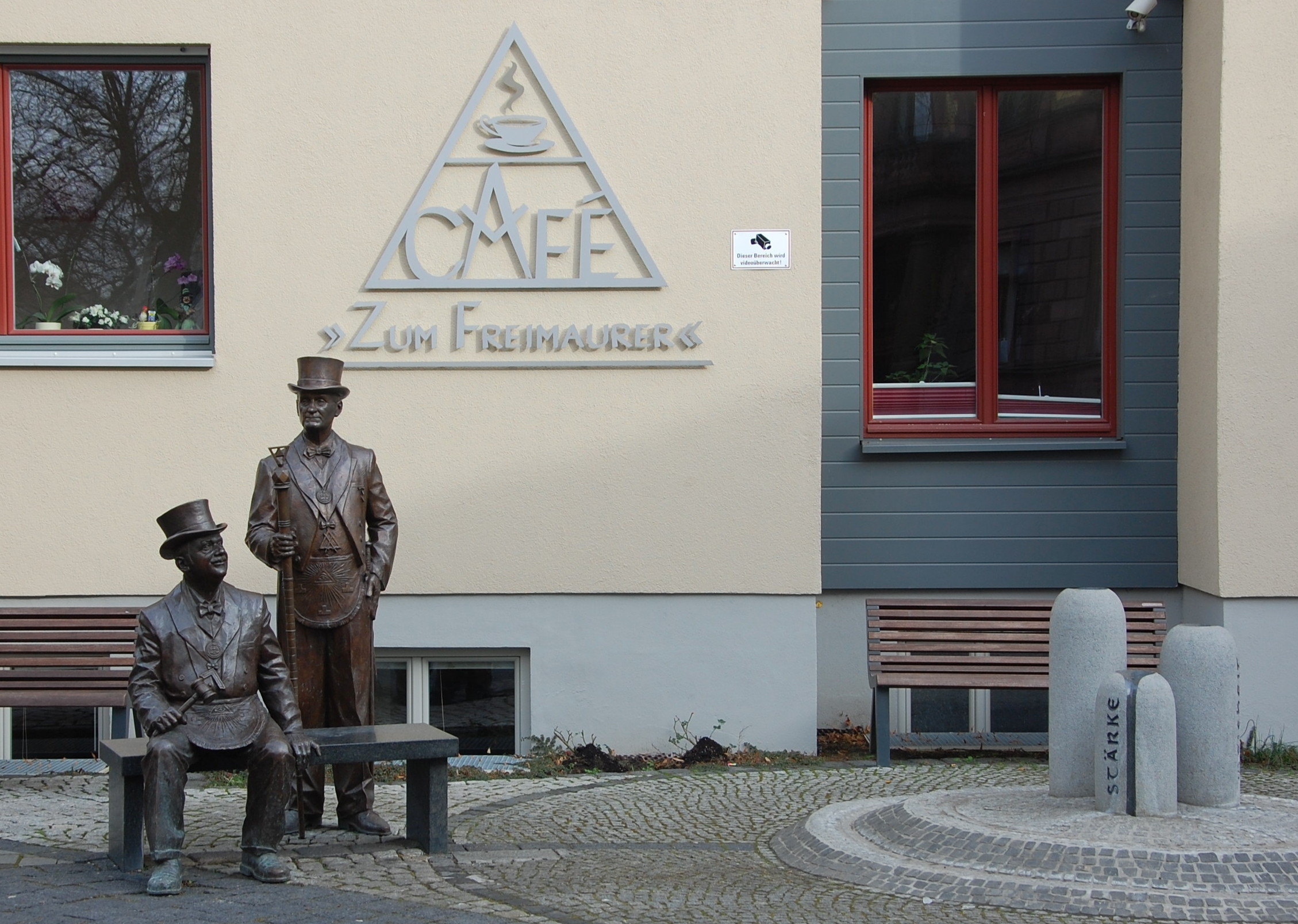 Haus Heiliggeiststraße 10 in Quedlinburg